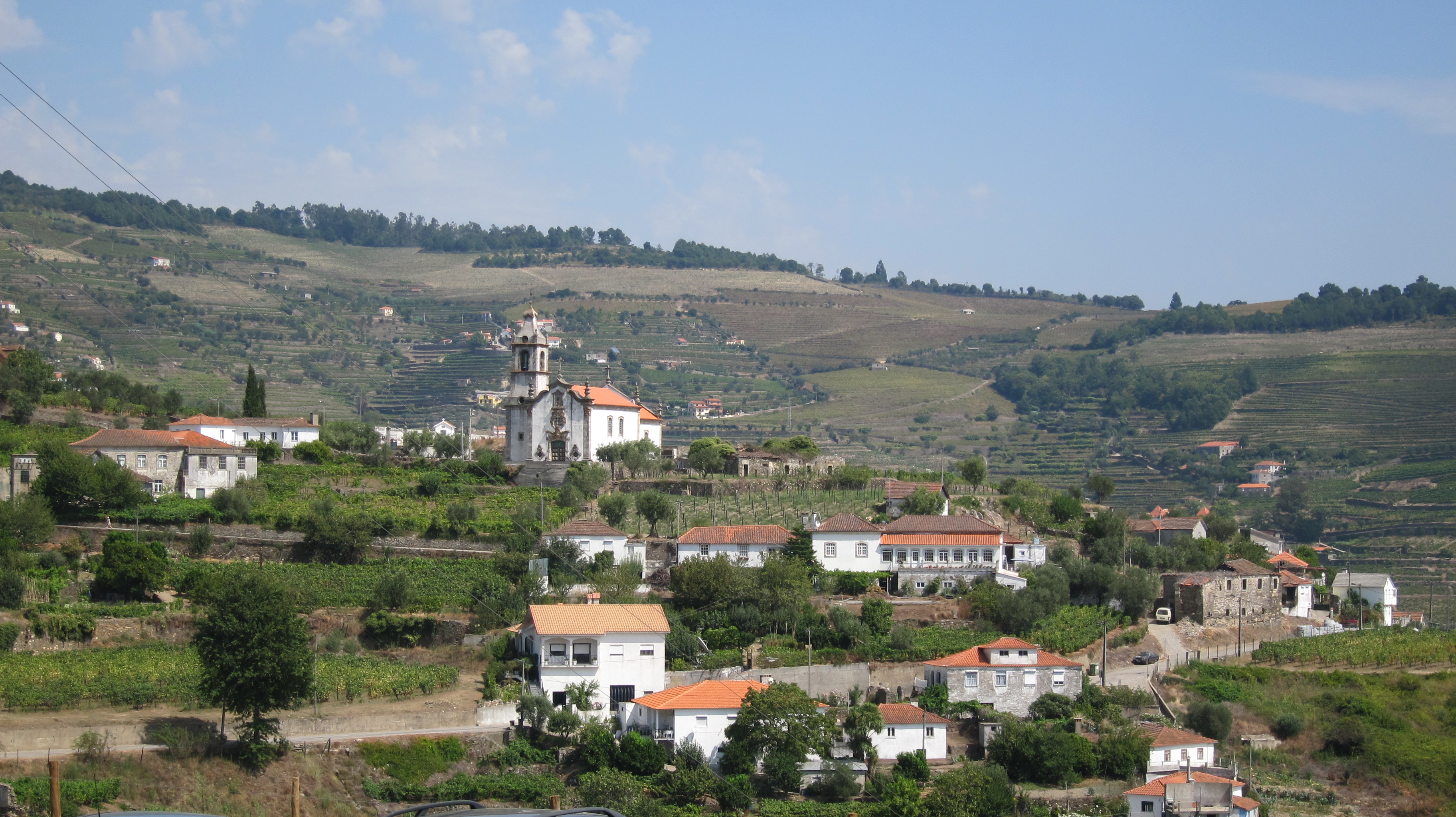 Cidadelhe, Mesão Frio